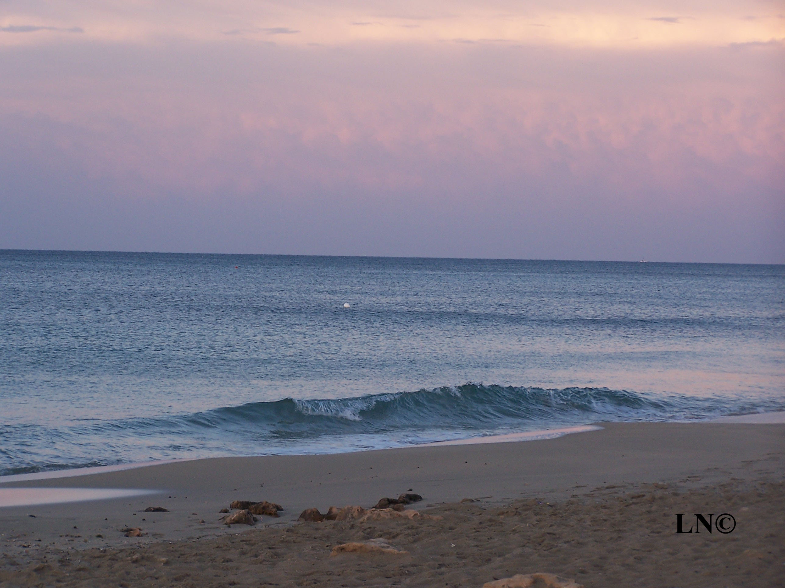 Fotografia personale di Luigi Nicassio